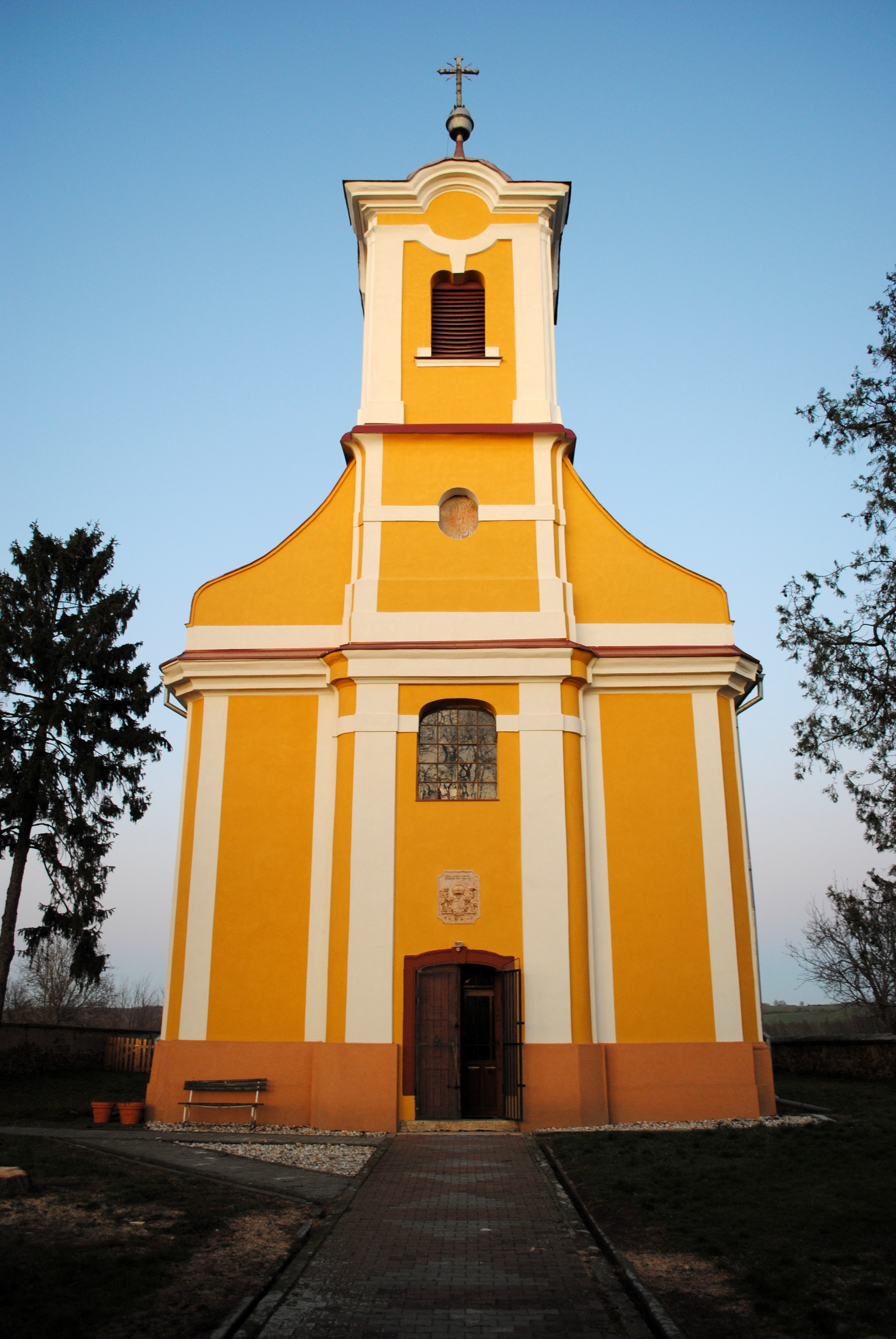 Nemesoroszi Nagyboldogasszony temploma